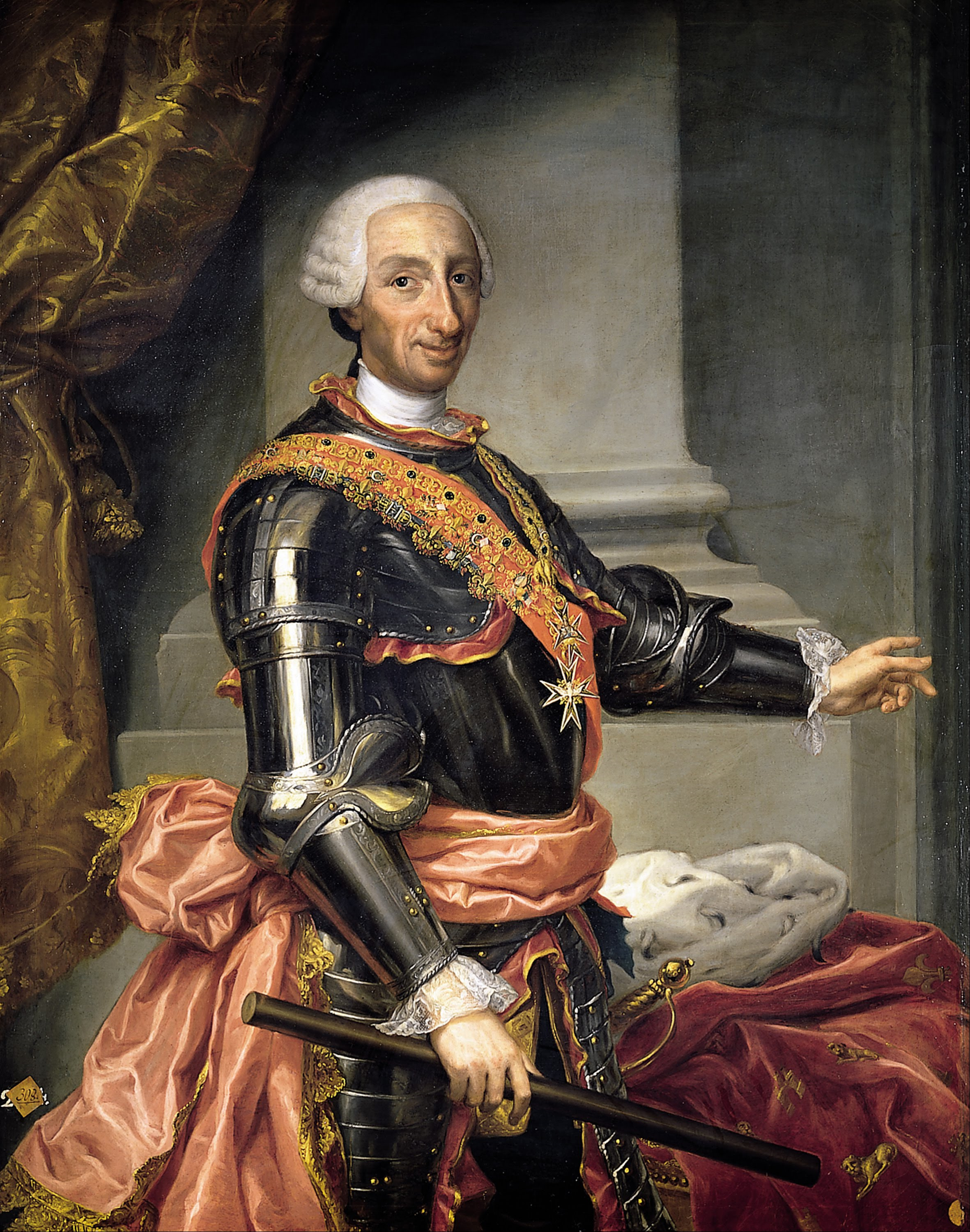 Retrato del rey Carlos III de España (1716-1788). Esta obra, que fue pintada por Andrés de la Calleja, es una copia del retrato del mismo monarca realizado por Anton Raphael Mengs y conservado en el Museo del Prado. Esta copia fue donada a la Real Academia de Bellas Artes de San Fernando por su autor en 1777, y el rey Carlos III aparece de pie, cubierto con armadura, con un fajín rojo en su cintura y con una bengala en su mano derecha. Y también lleva los collares de la Orden del Toisón de Oro, de la Orden del Espíritu Santo y de la Orden de San Jenaro, que fue creada por el propio Carlos III al comienzo de su reinado en Nápoles.